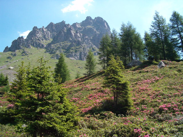 Monte Cauriol (Lagorai), Vanoi, Trentino, Italy